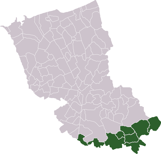 Leiedal - Val de la Lys: Locatie in arrondissement Duinkerke. Zelfgemaakt. Location in the arrondissement of Dunkirk. Self made. Localisation dans l'arrondissement de Dunkerque. Fait moi-même.